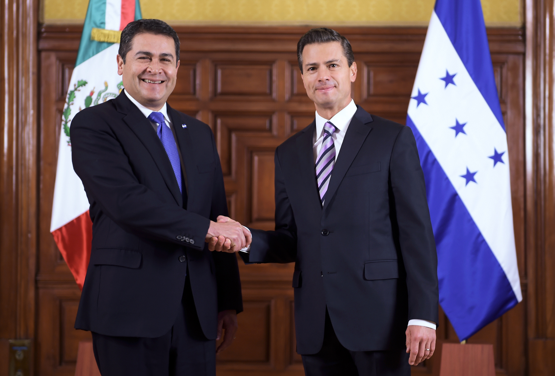 Juan Orlando Hernandez-Enrique Peña